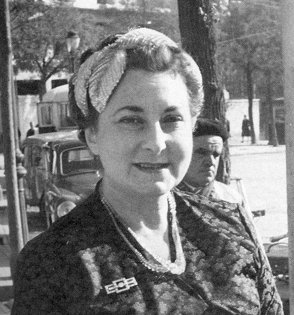 Jeane Mordó